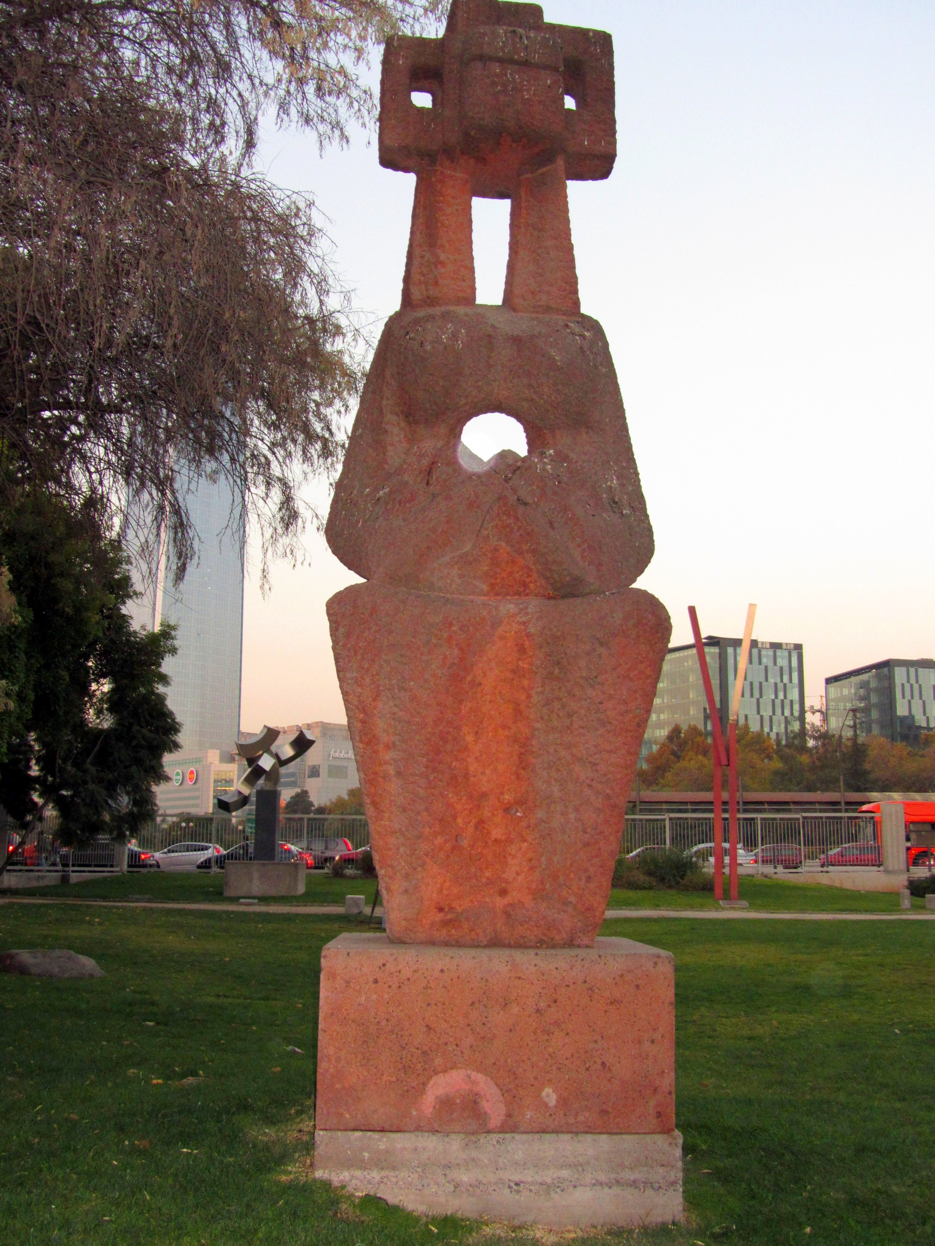 Madre Tierra / Pachamama de la escultora chilena Marta Colvin, Museo Parque de las Esculturas, Santiago